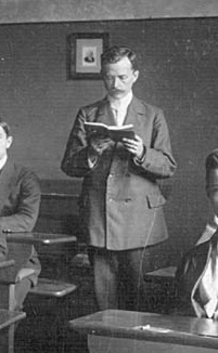 Carl Johann Fredrich (1871–1930)